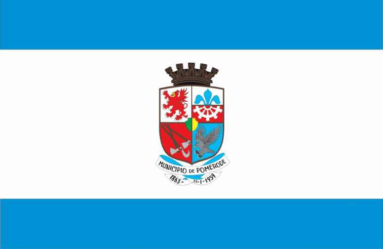 Pomerode municipalty flag